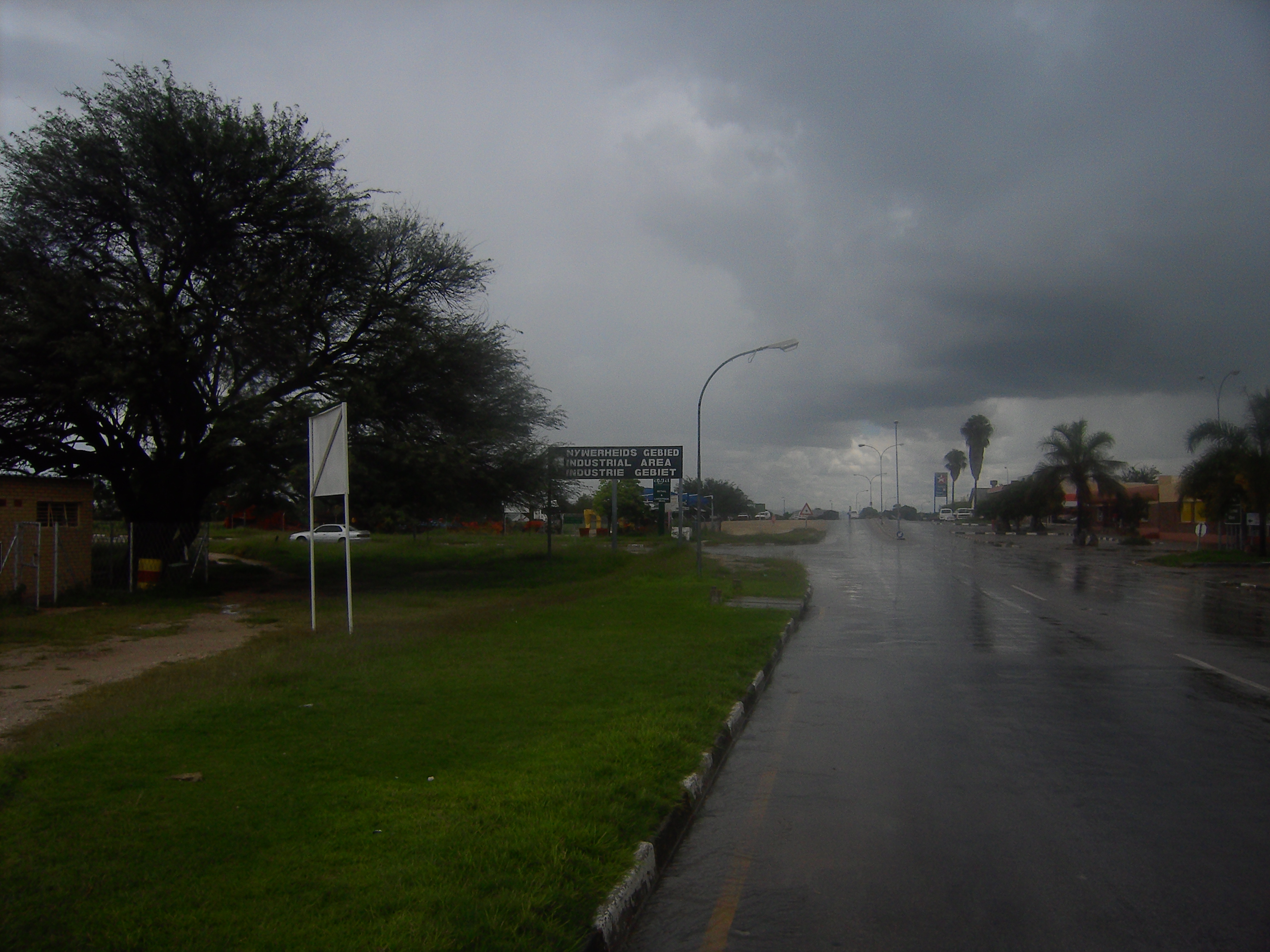 Hauptstrasse von Grootfontein mit mehrsprachigem Straßenschild